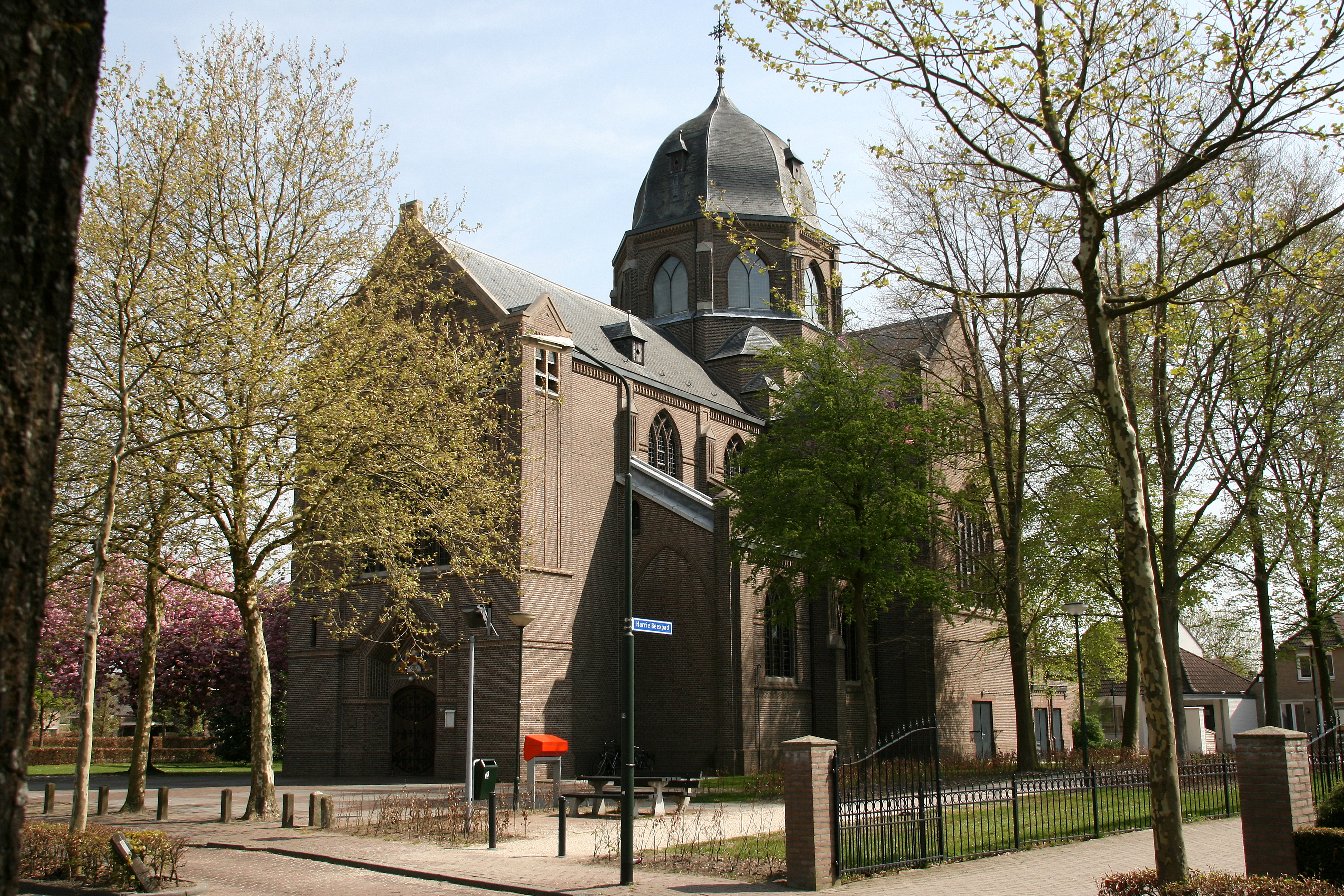 Hoogeloon - Hoofdstraat 50-52 - St.Pancratiuskerk